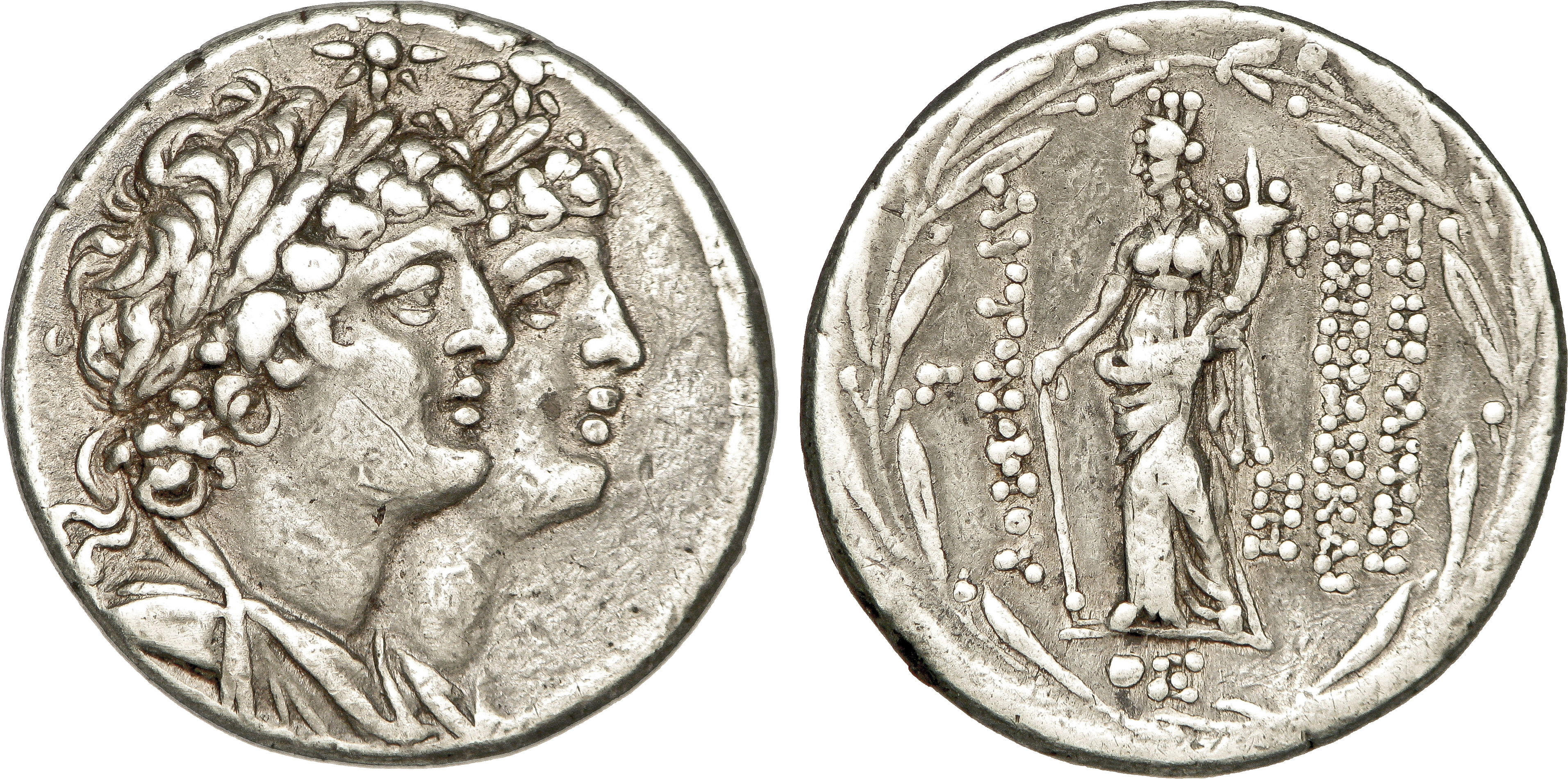 Nom de l'atelier : Phénicie, Tripolis Métal : argent Diamètre : 28mm Axe des coins : 1h. Poids : 15,26g. Titulature avers : Anépigraphe. Description avers : Bustes accolés des Dioscures laurés et drapés à droite, surmontés chacun d’une étoile ; le tout entouré de la stemma. Description revers : Tyché tourelée debout à gauche, vêtue du chiton, tenant un timon de la main droite et une corne d’abondance de la main gauche ; le tout dans une couronne de laurier. Légende revers : TRIPOLITWN/ THS IERAS KAI// AUTONOMOU/ G/ IH /QS Traduction revers : (de Tripoli la sainte et autonome).